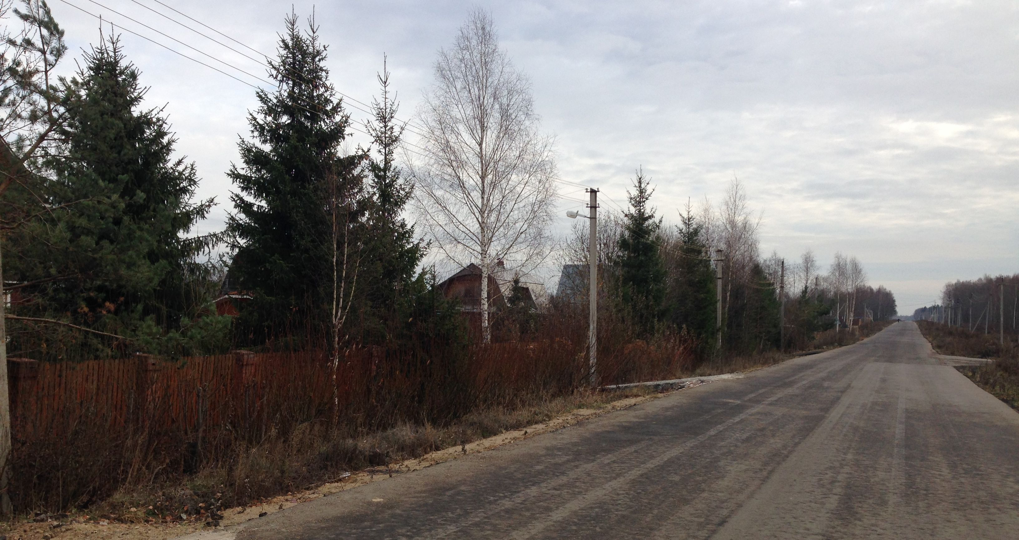 Деревня Коришево (Талдомский район, Московская область).